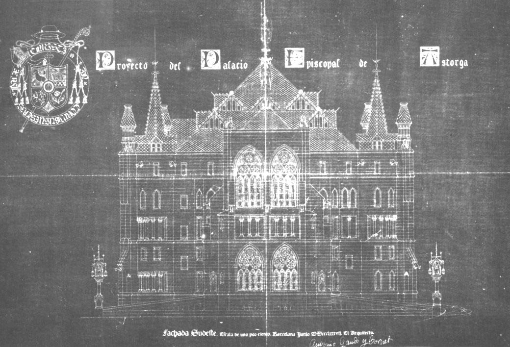 Fachada del Palacio Episcopal de Astorga, de Antoni Gaudí (1887).